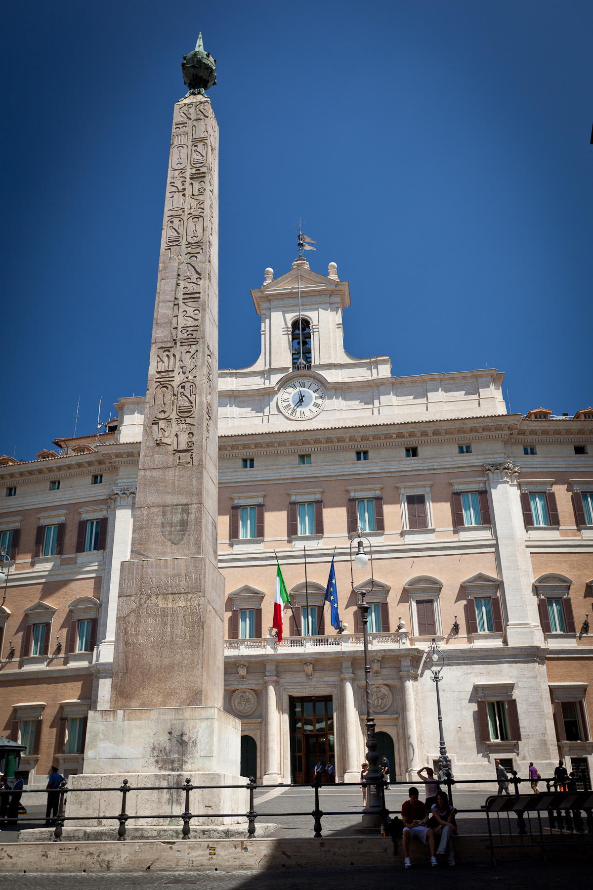 Obelisco di Montecitorio Roma